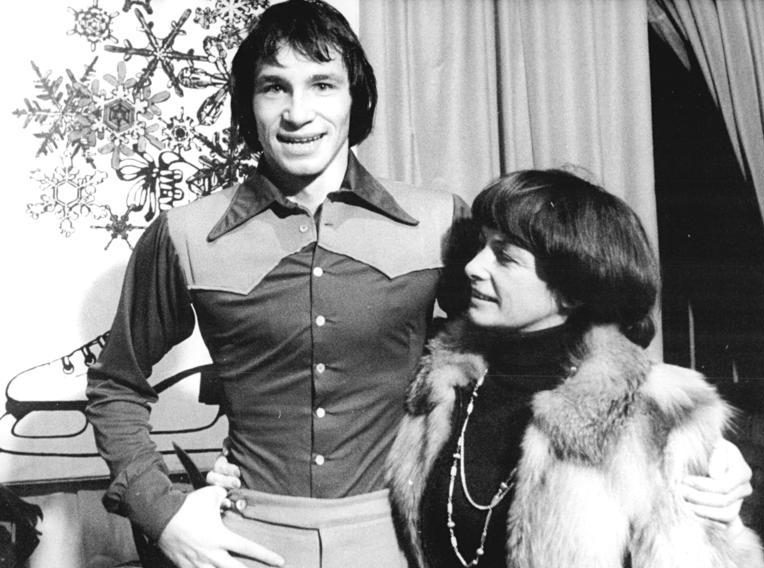 Jan Hoffmann, Jutta Müller ADN-ZB Gahlbeck 13.12.1975 Berlin: DDR-Meisterschaften im Eiskunstlaufen.- Keine Konkurrenz zu fürchten hatte Ex-Weltmeister Jan Hoffmann (SC Karl-Marx-Stadt), der nach einjähriger Verletzungspause seinen dritten Meistertitel bei den Herren errang. Nach seiner Kür am 13.12.1975 freut er sich gemeinsam mit Trainerin Jutta Müller über den Erfolg.